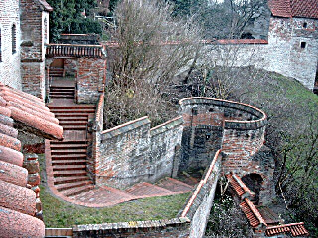 Fürstentreppe in Landshut (2003)